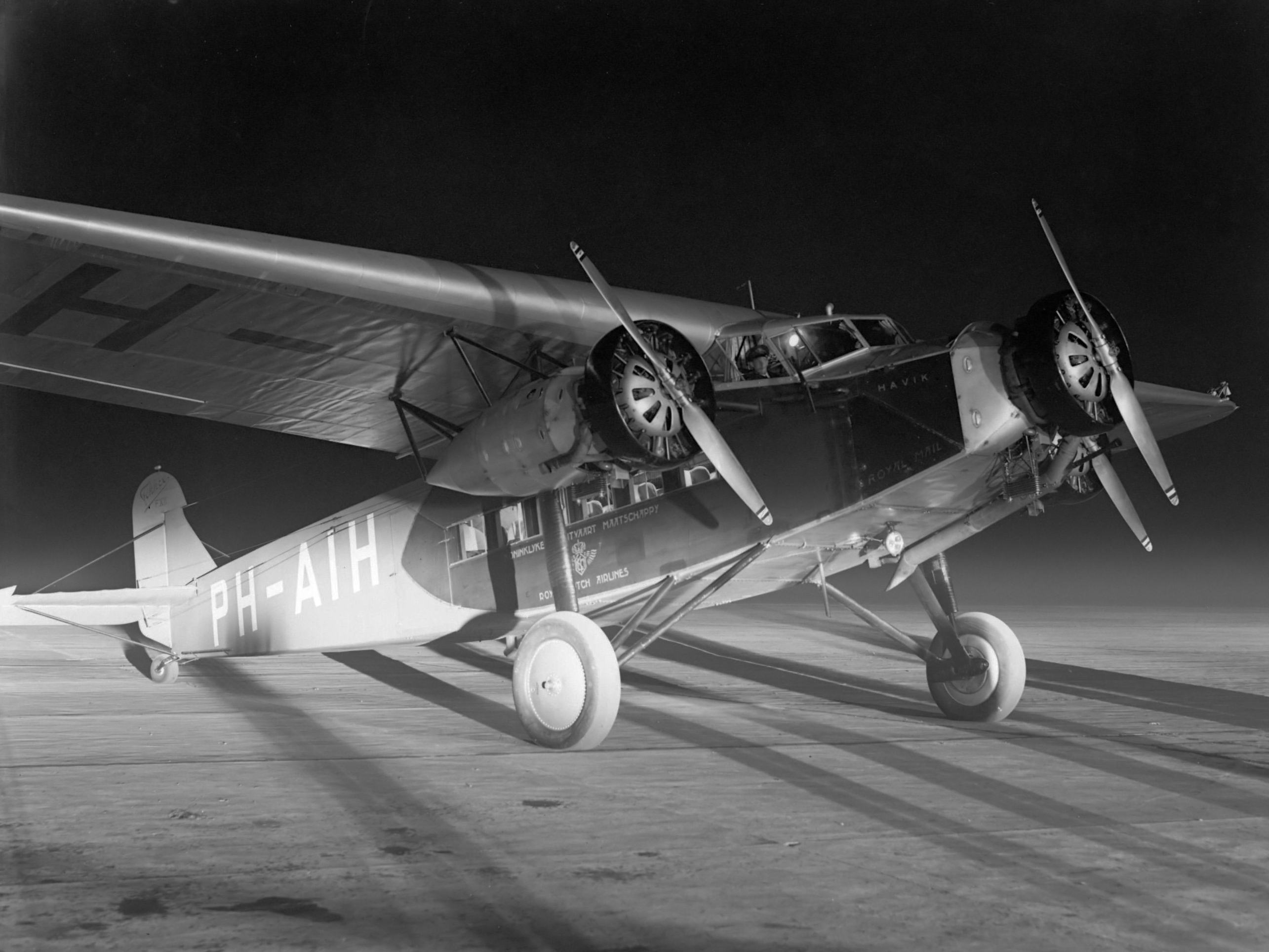 Reportage Schiphol. Postvliegtiuig op Schiphol 1933